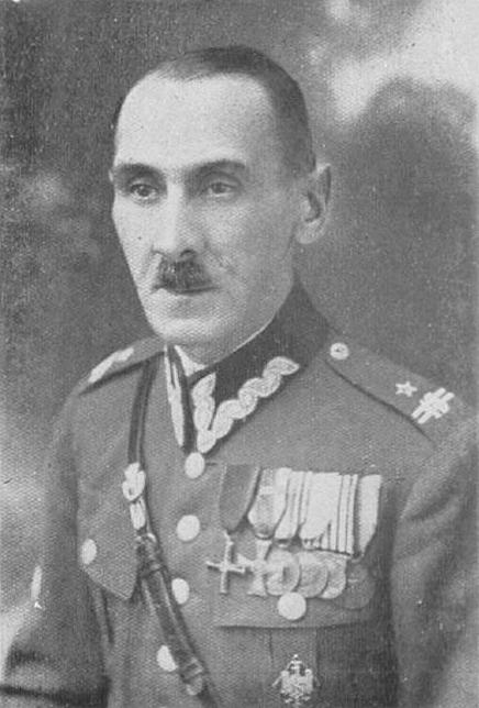 Antoni Kazimierz Jaworski (major 1890-1936)